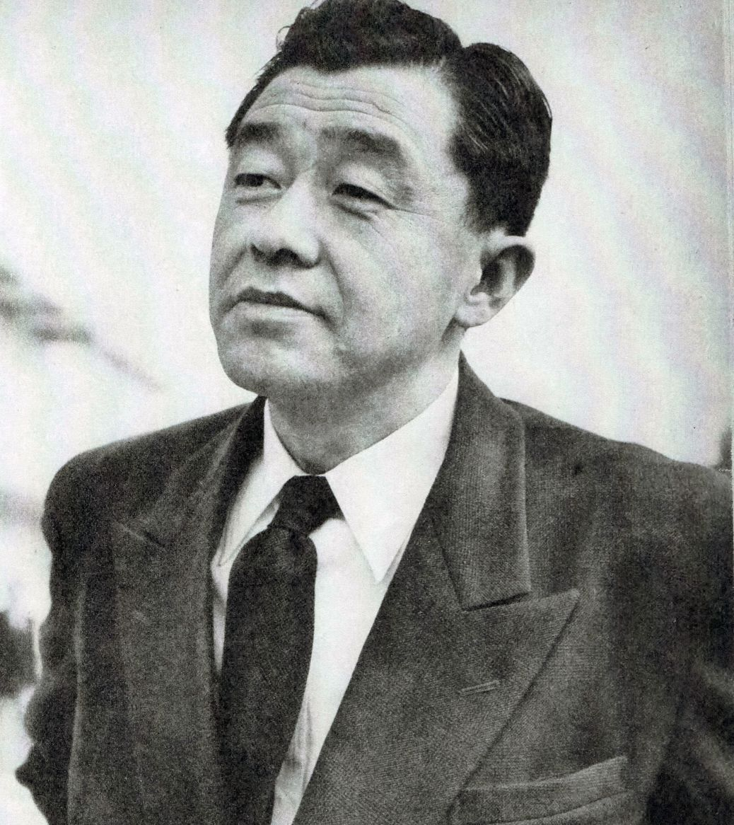 キネマ旬報社『キネマ旬報』第117号(1955)より児井英生